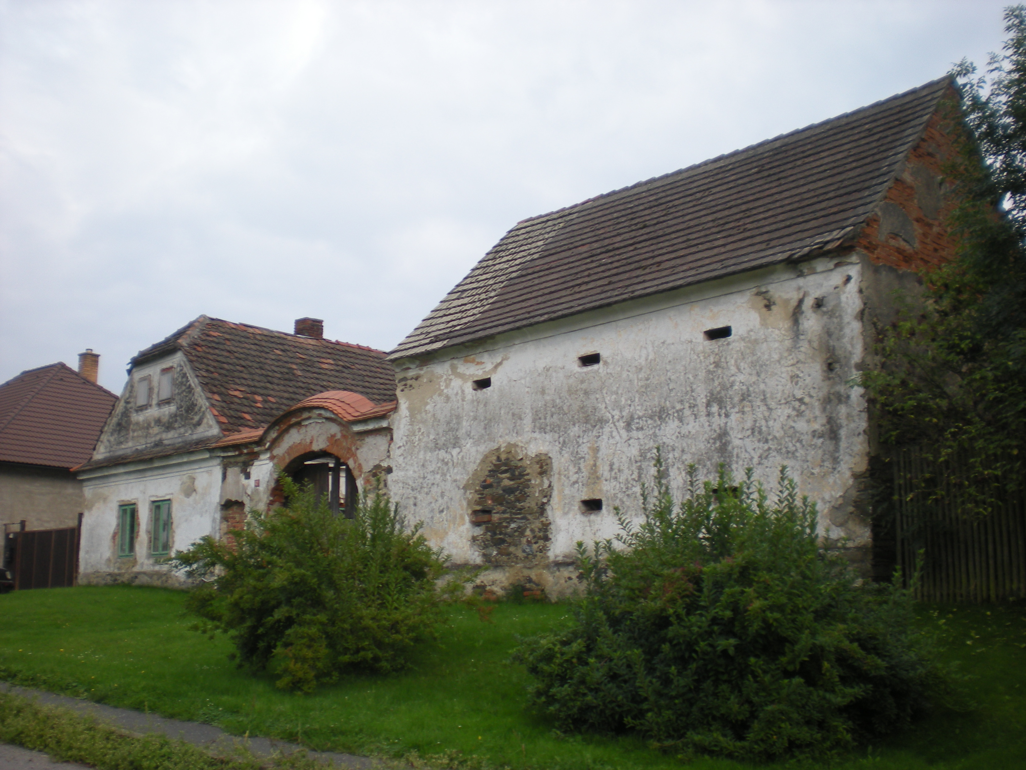 Usedlost čp. 42, Vlkaneč 42, Vlkaneč.